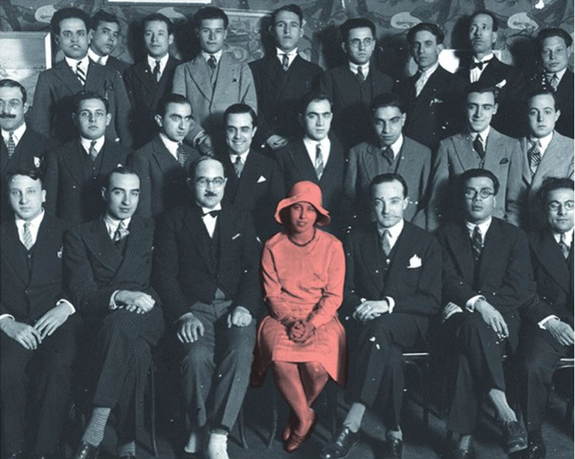 Cette photo représente un groupe d'étudiants tunisiens, membres de l'AEMNA (association des étudiants musulmans nord-africains), à Paris, en 1930, prise à l'occasion de la visite que leur a rendue M. Mohamed Ali Annabi. Assis, première rangée, de gauche à droite : Mohamed Ali Annabi (premier polytechnicien tunisien), Chadli Ben Romdhane (Médecine), le Dr Salem Esch-Chadely (président fondateur de l'AEMNA, premier psychiatre tunisien), Tawhida Ben Cheikh (Médecine), Tahar Zaouche (Médecine), Mohamed Sakka (Médecine), M. Mohamed Attia (Lettres, qui sera le premier agrégé d'arabe et futur directeur du Collège Sadiki).